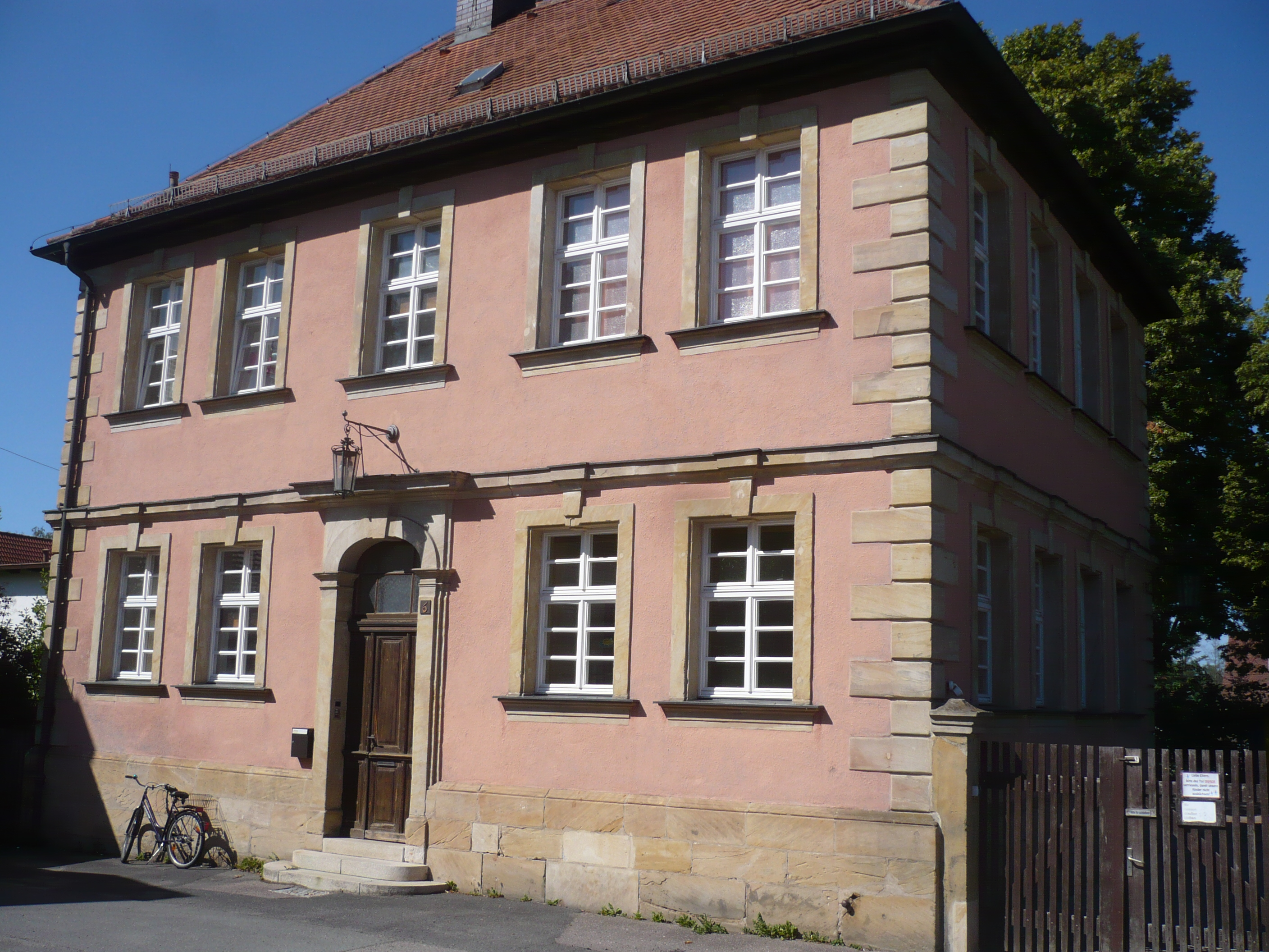 Schlößlein in Bayreuth-Altstadt